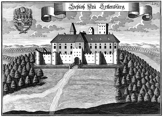 Schloss Neu-Ortenburg, ehemaliges Schloss in der heutigen Gemeinde Ortenburg. In: Historico-Topographica Descriptio. Dritter Theil. München: Johann Lucas Straub, 1723.